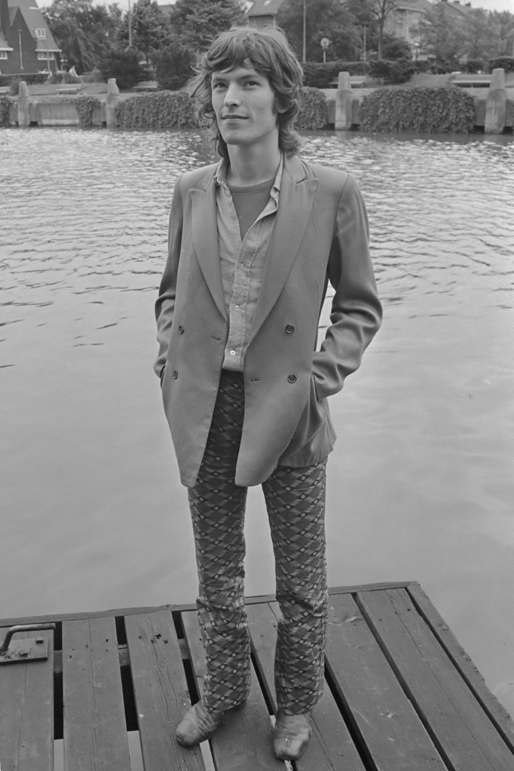 Stevie Winwood van beatgroep Traffic en beatgroep Free in Amsterdam